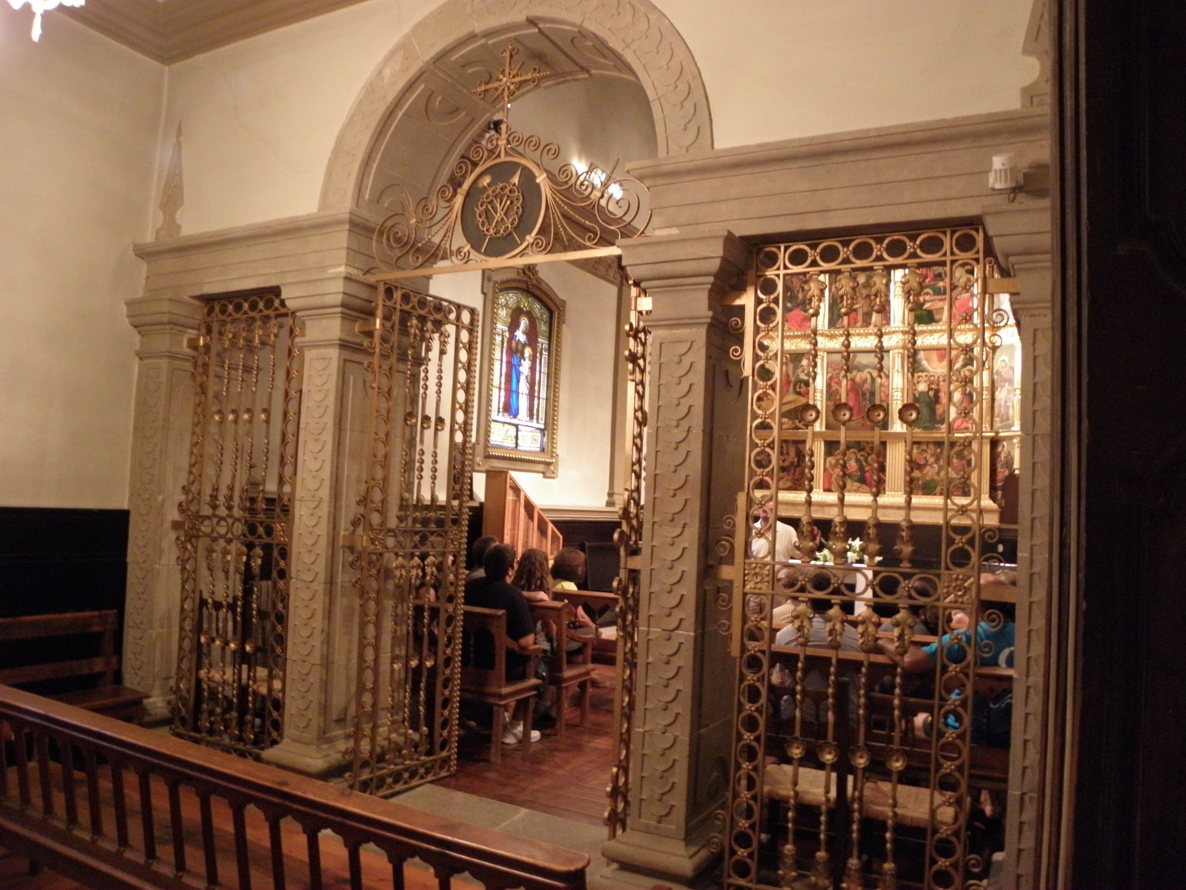 La capella del Santíssim, a l'església del Miracle (Riner, Solsonès). Damunt de l'altar, el retaule gótic-renaixentista del Miracle